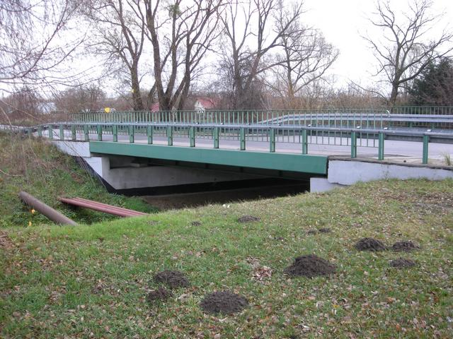 Most nad Kanałem Rybnym, Szczecin